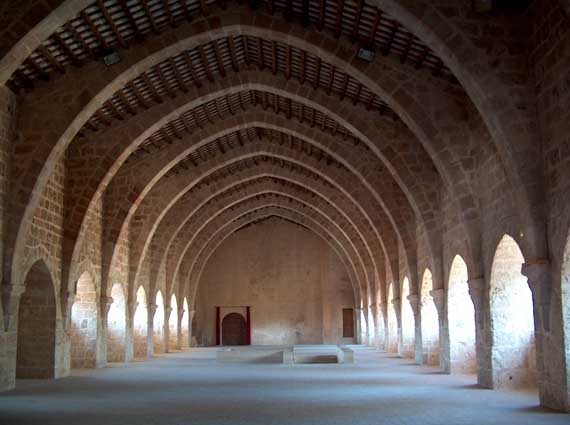 Dormitorio de los monjes del Monasterio de Santes Creus